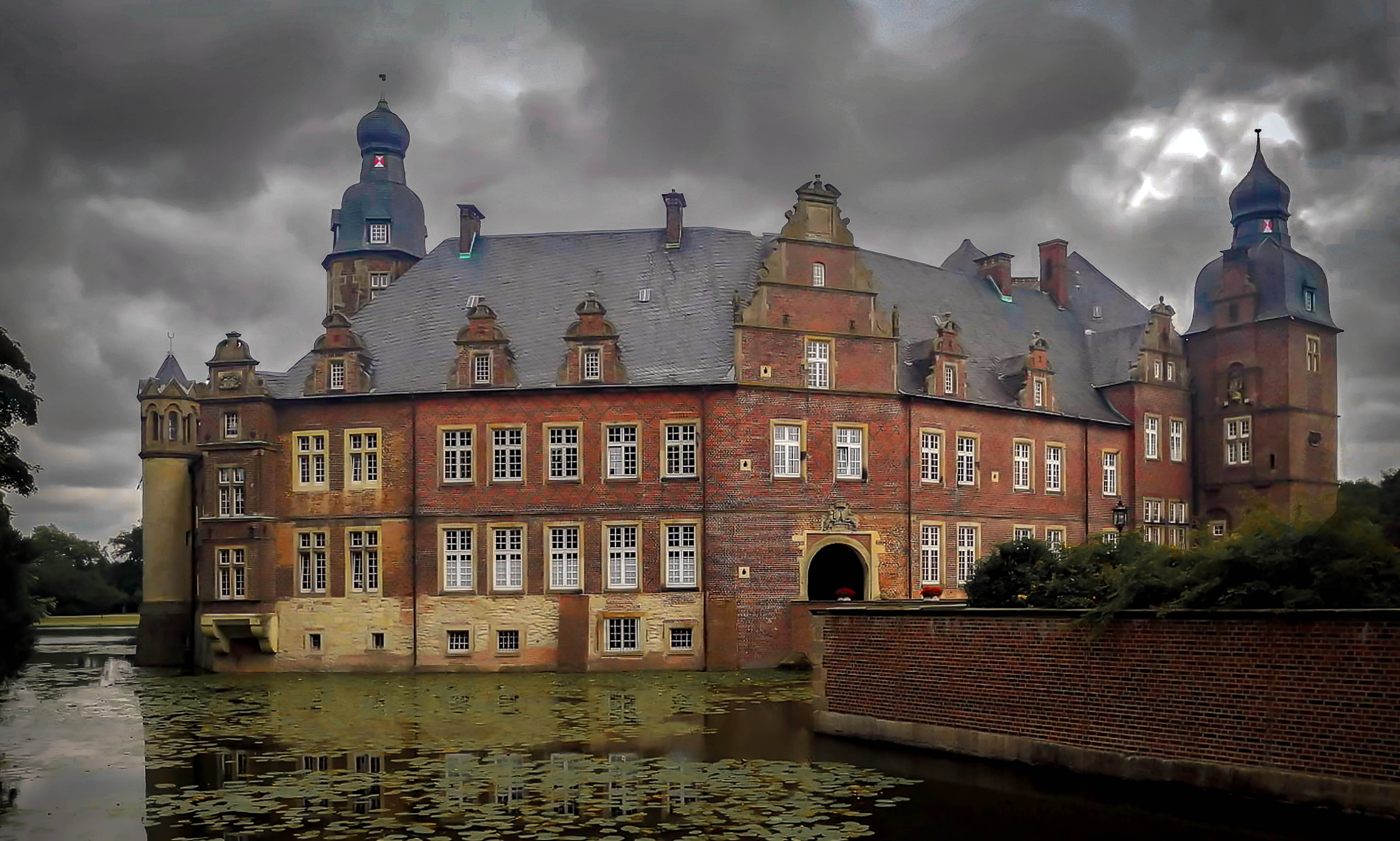 Schloss Darfeld (Südansicht)